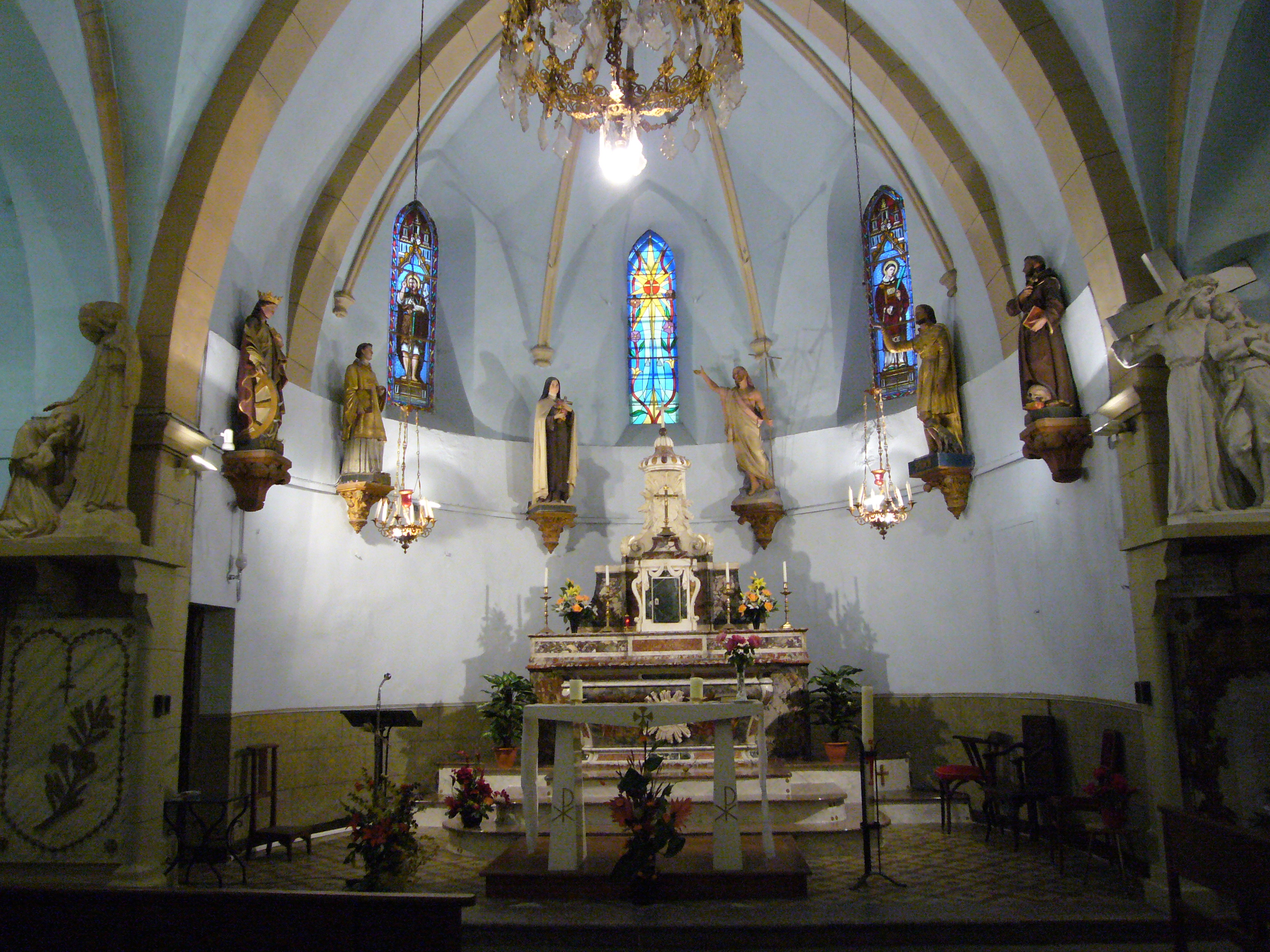 Autel et chœur de l'église Saint-Étienne de Caramany (66, France)